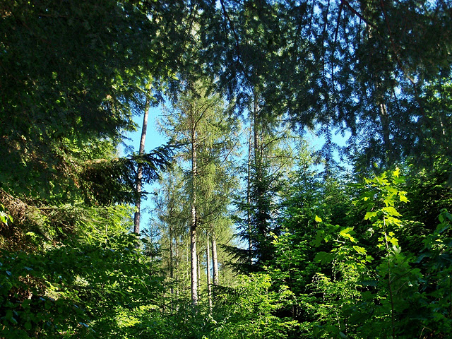 Jedno z ujęć pokazujący piękno lasu w Cierpiszu